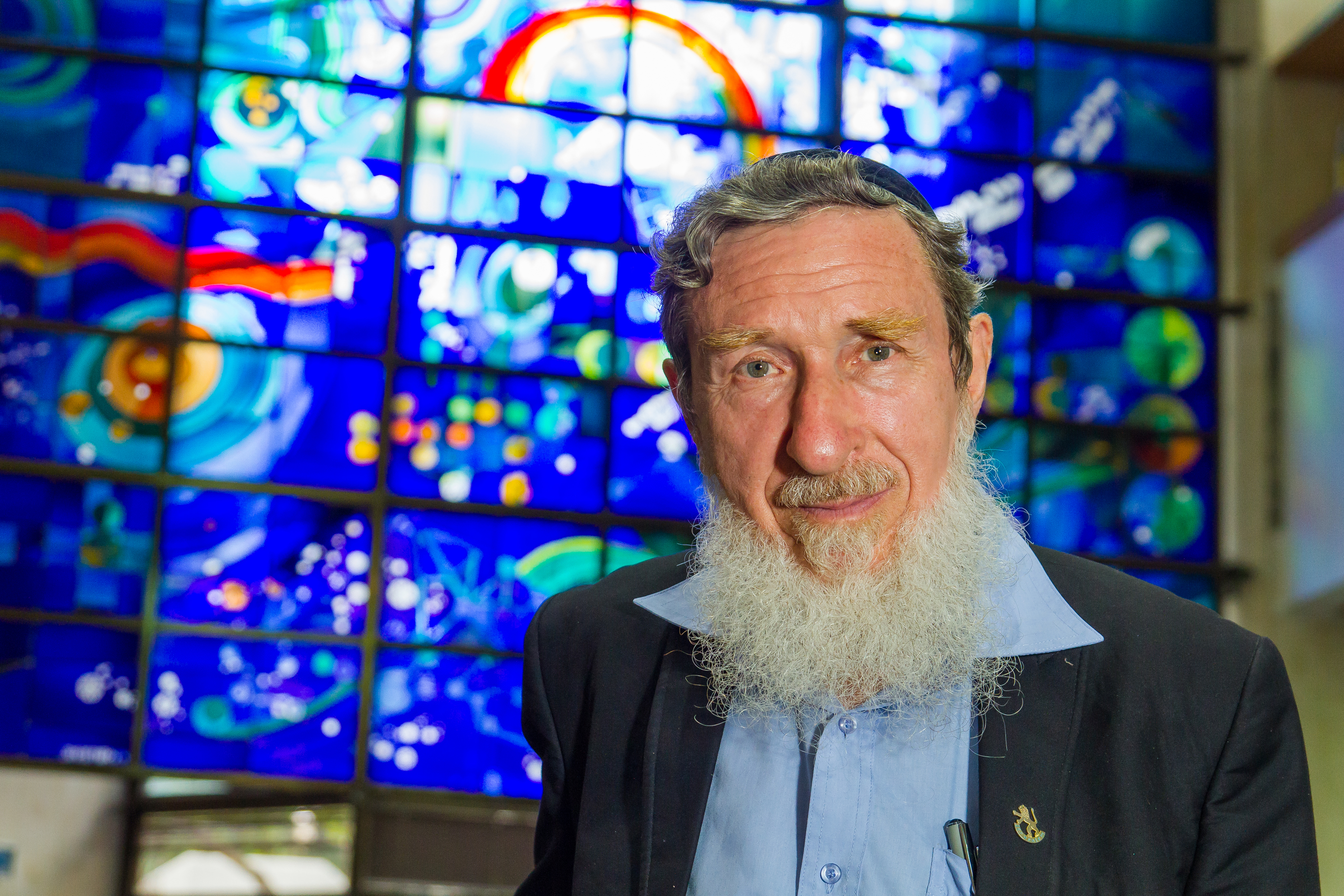 Prof. Daniel Sperber